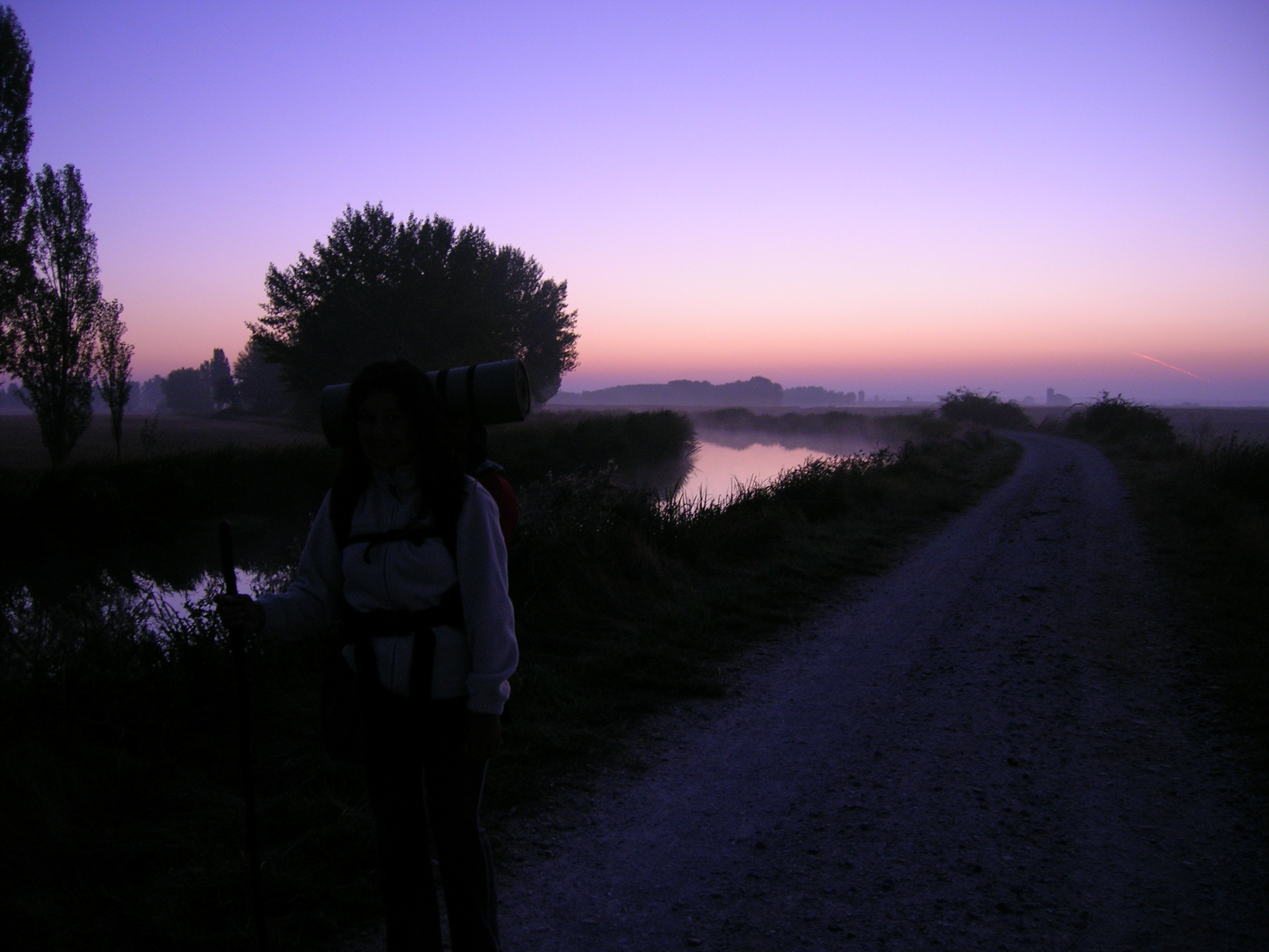 Precioso amanecer saliendo de Boadilla del Camino (al Fondo: la Iglesia de Boadillo). Para que luego hablen de las digitales compactas y sus casi nulas posibilidades de ajuste. Ya que no te dejan jugar con la velocidad y la apertura, es cuestión de ir probando los diferentes programas. Esta foto está dedicada a la peregrina que casi no se ve en la foto.